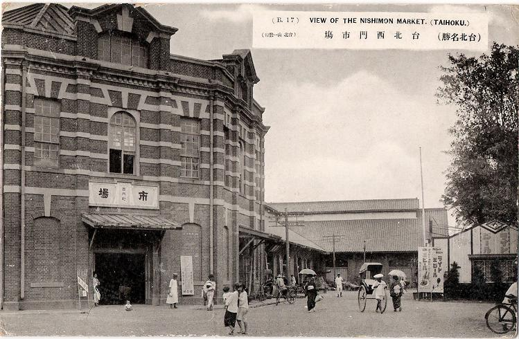 日據時期台北西門市場。